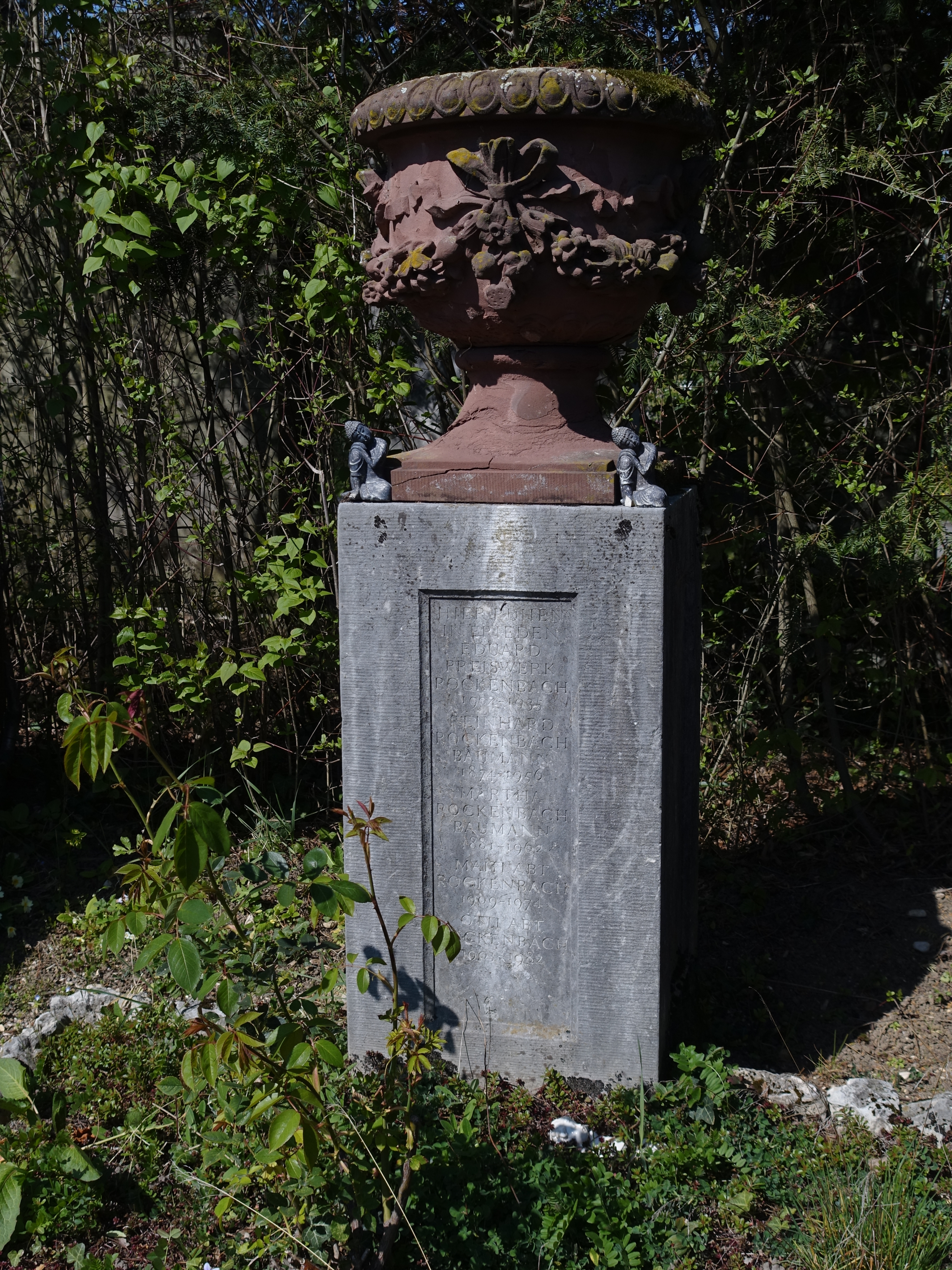 Familiengrab: Otto Abt-Rockenbach (1903–1982) Kunstmaler, Pazifist. Friedhof Wolfgottesacker, Basel. Eduard Preiswerk-Rockenbach (1904–1935), Architekt, Bauunternehmer, «Preiswerk&Cie.» Reinhard Rockenbach-Baumann (1874–1956), Martha Rockenbach-Baumann (1881–1962), Martha (Malti) Abt-Rockenbach (1909–1974), war die erste Frau von Eduard Preiswerk-Rockenbach (1904–1935), Architekt und spätere Frau von Otto Abt-Rockenbach (1903–1982)